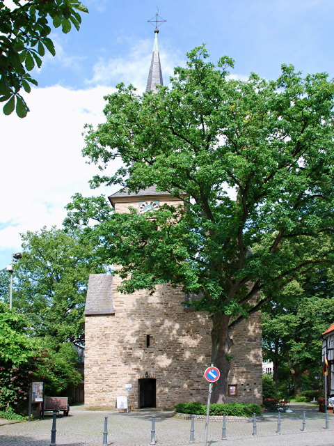 Turmseite der evangelischen Dorfkirche Wengern, Kirchstr. 8, Wetter-Wengern – Die rund 140 Jahre alte Eiche im Bild wurde am 26.11.2012 gefällt.[1] This is a photograph of an architectural monument.